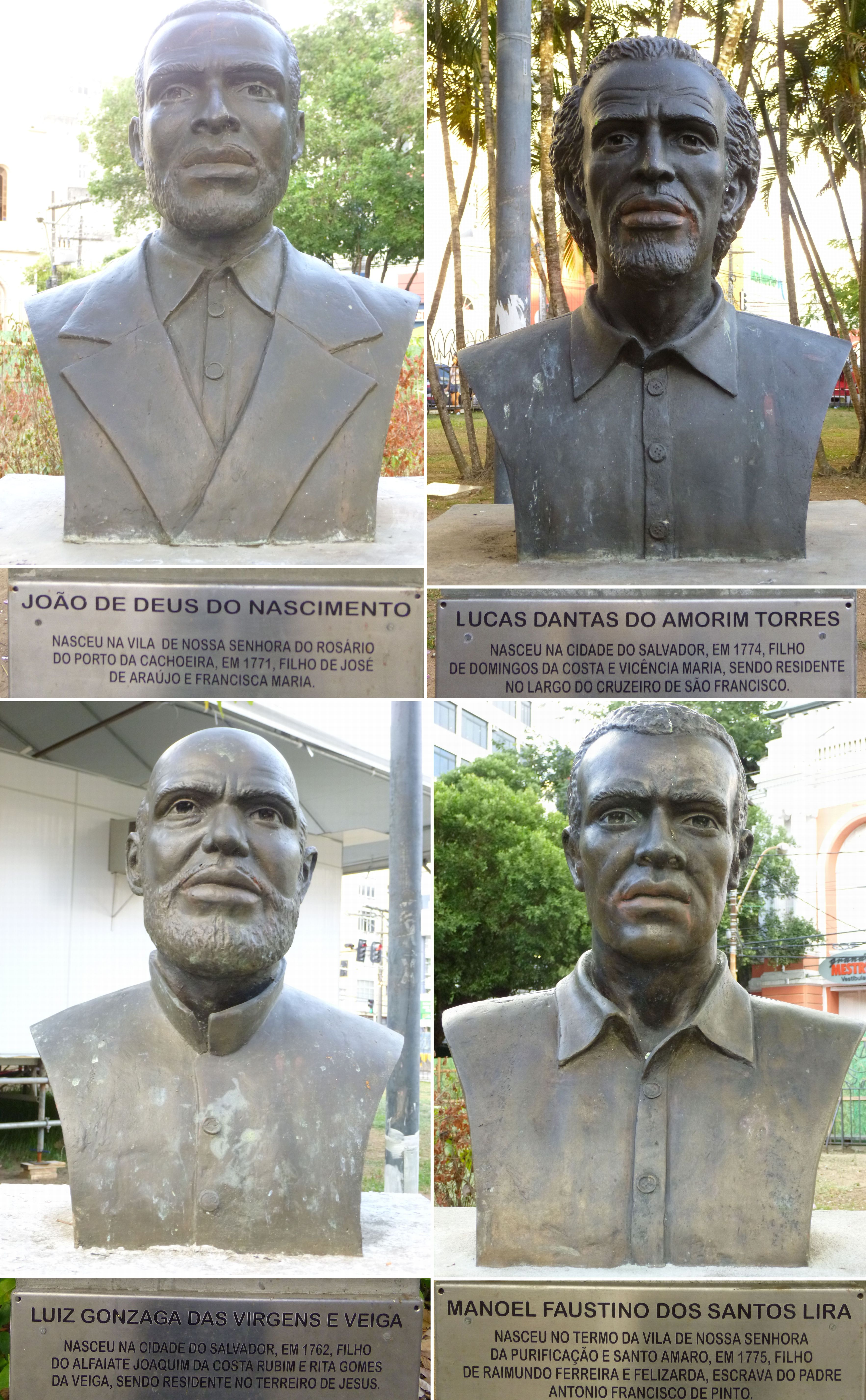 Alfaiates na Praça Piedade, Salvador, Bahia